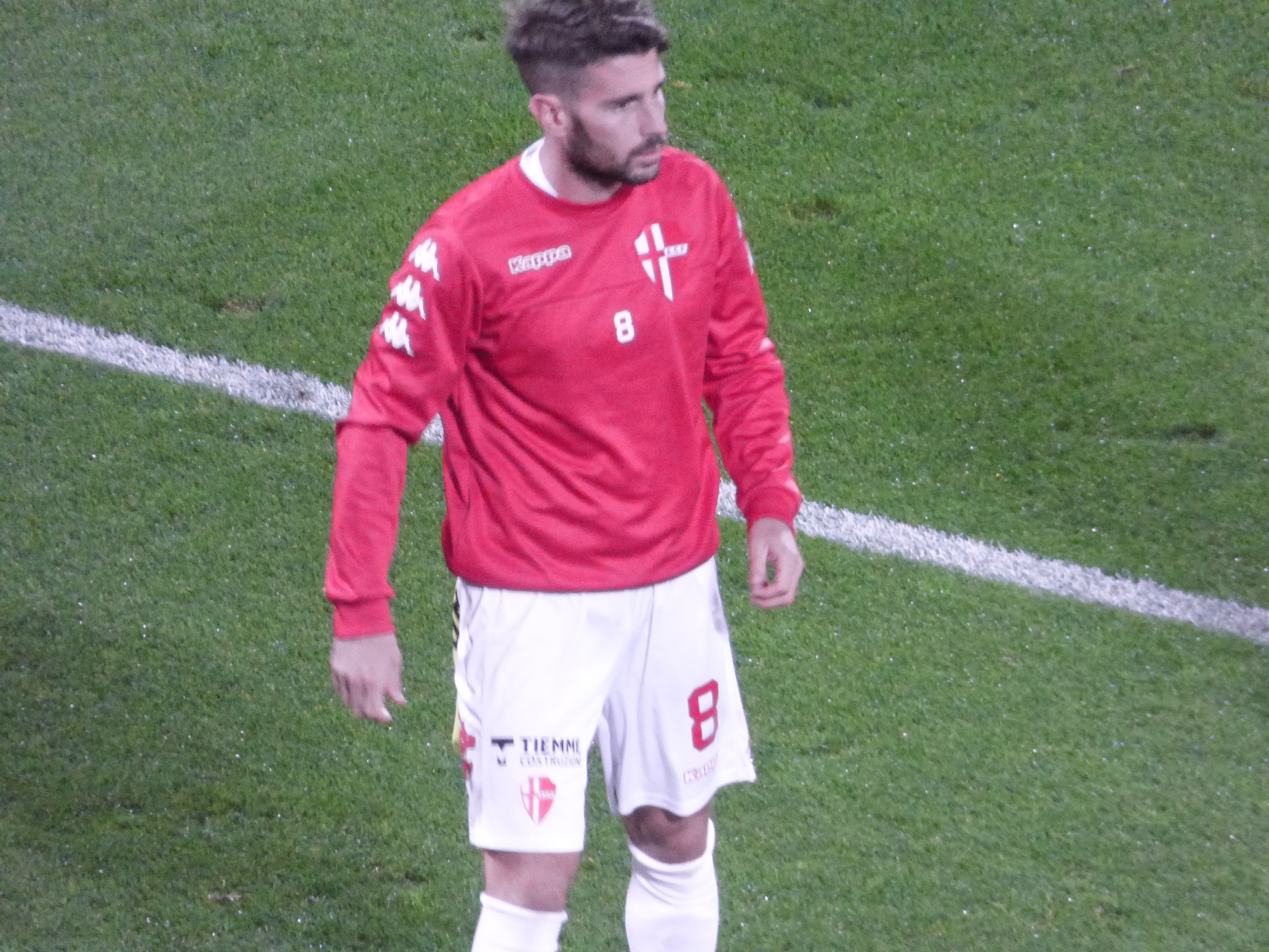 Mattia Minesso lors du match amical RC Lens - Calcio Padova, le 11 octobre 2018 au Stade Bollaert-Delelis de Lens.